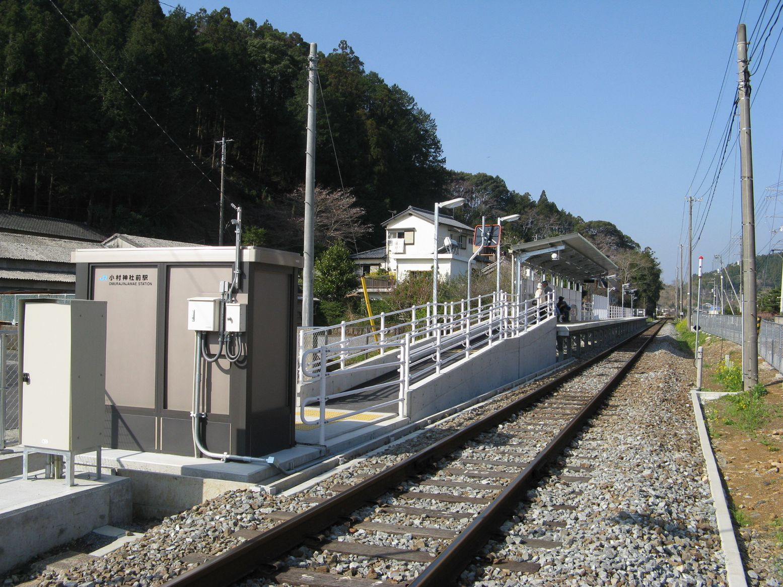 小村神社前駅 西望